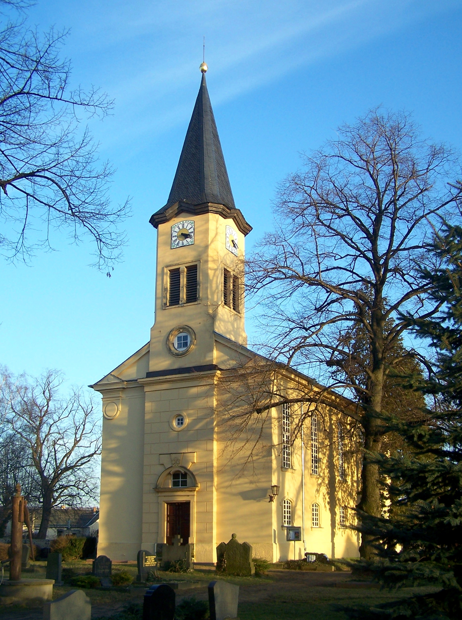 Jakobuskirche Niederau, Landkreis Meißen